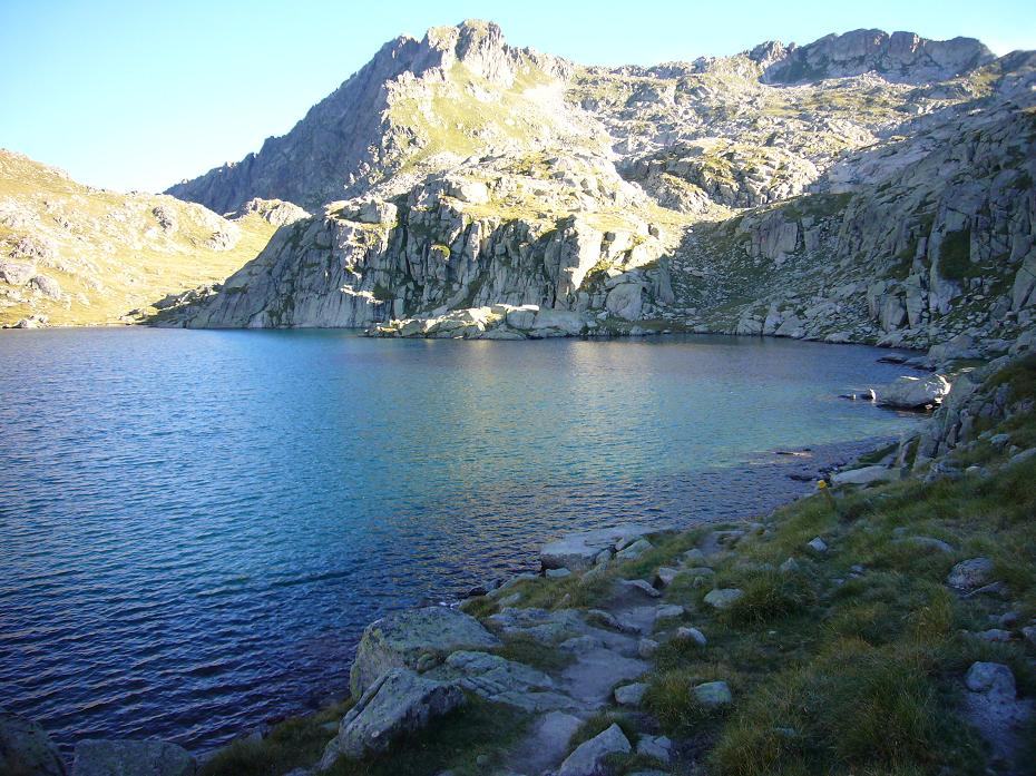 Montardo, Montardo Petit i Coret de Oelhacrestada; la Vall de Boí, Alta Ribagorça, Catalunya